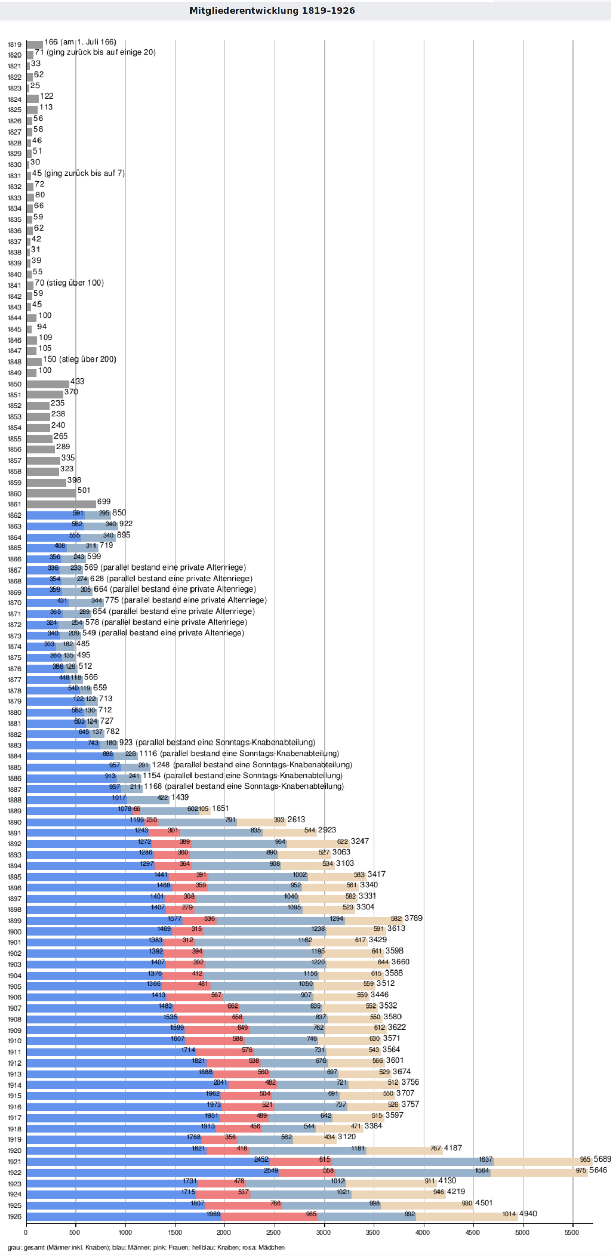 Mitgliederentwicklung der Hamburger Turnerschaft von 1816 in den Jahren 1819–1826) (erstellt anhand der Festschrift zum 110. Stiftungsfest aus dem Jahr 1926 der HT 16, S. 16–17.)